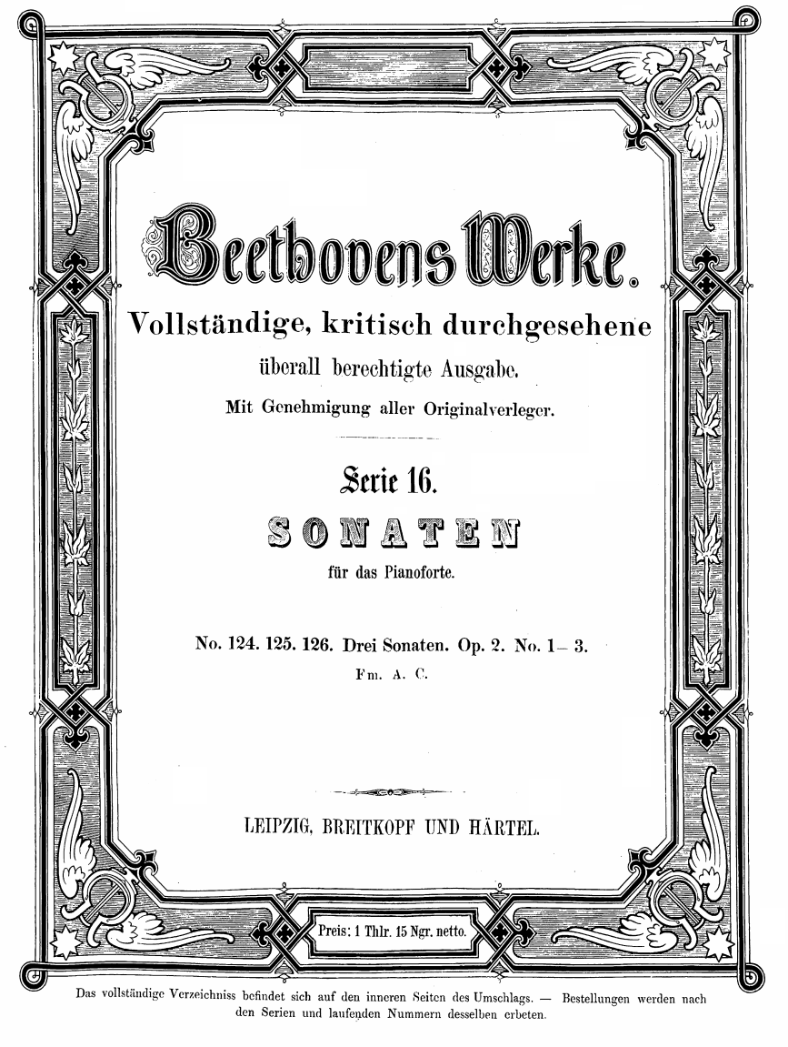 Edition de la première sonate de Beethoven dans Ludwig van Beethovens Werke, Serie 16: Sonaten für das Pianoforte, No.124 Leipzig: Breitkopf & Härtel, 1862. Plate B.124.